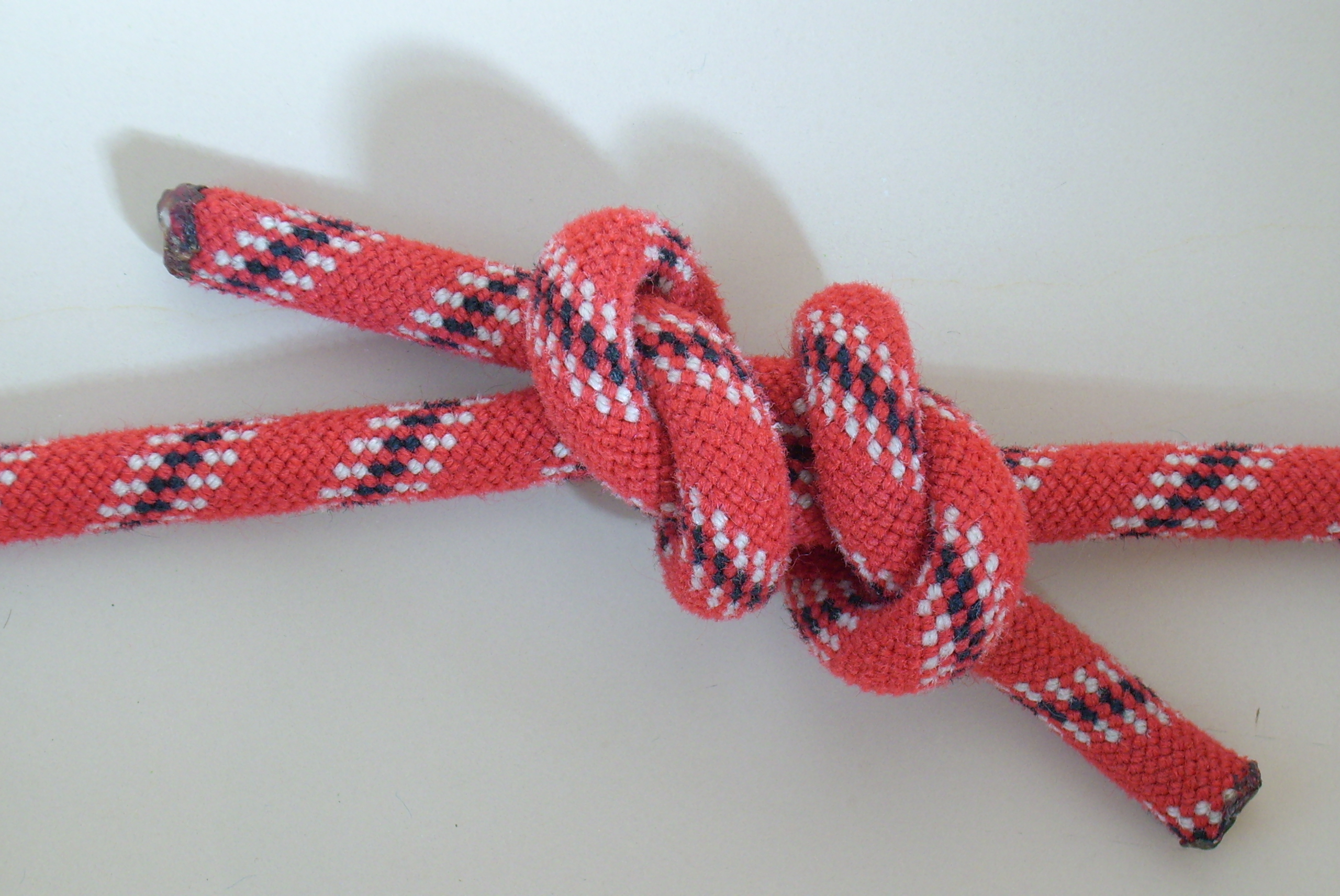 Spierenstich, zum Verbinden zweier Leinen